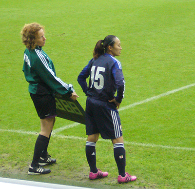 Karina Maruyama